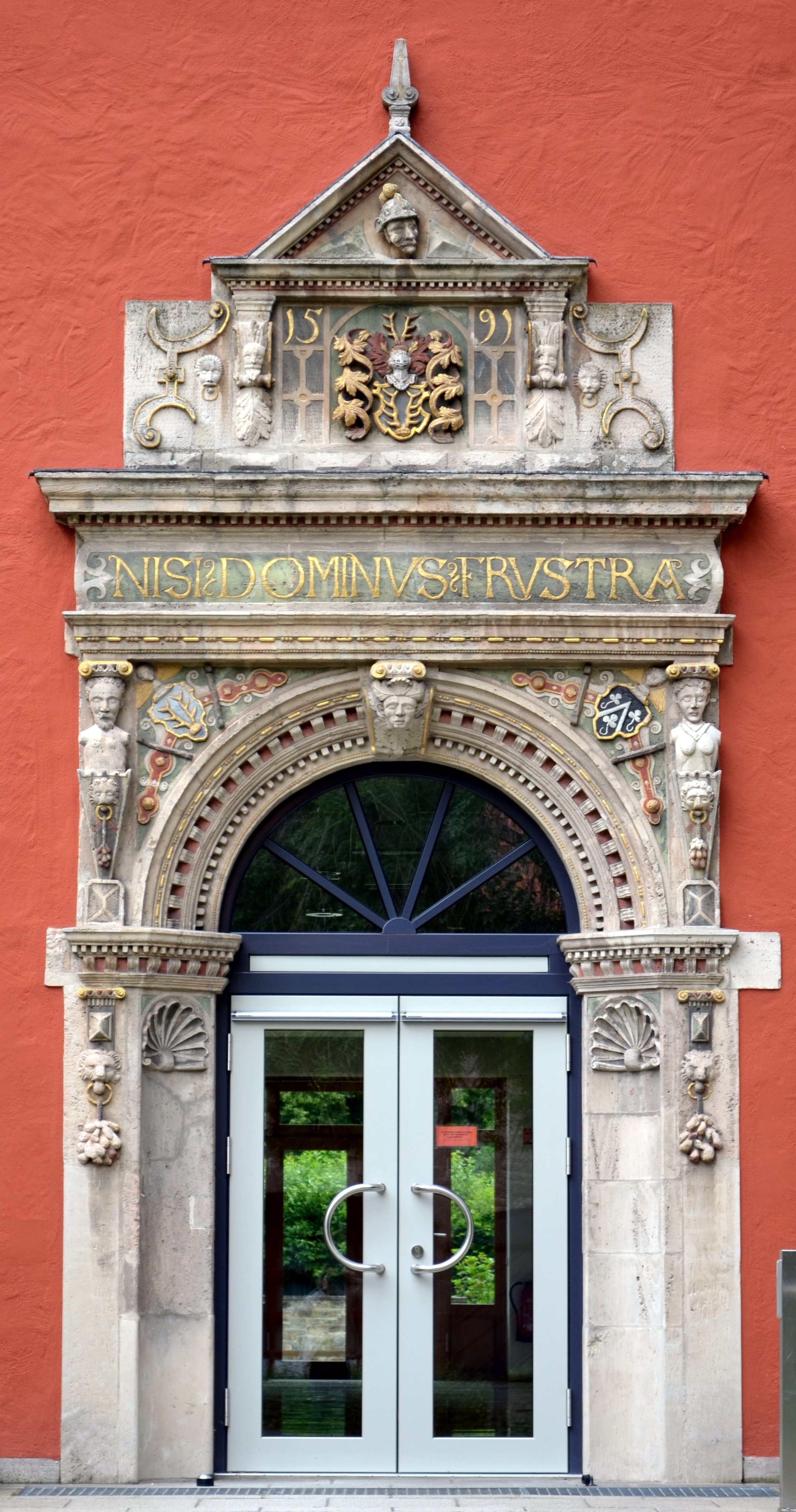 Braunschweig: Ehemaliges Eingangsportal des Gebäudes Südklint 15 („Brauner Hirsch“). Wahrscheinlich Wappen der Familie Hartwich. Heute befindet sich das Portal in Riddagshausen.